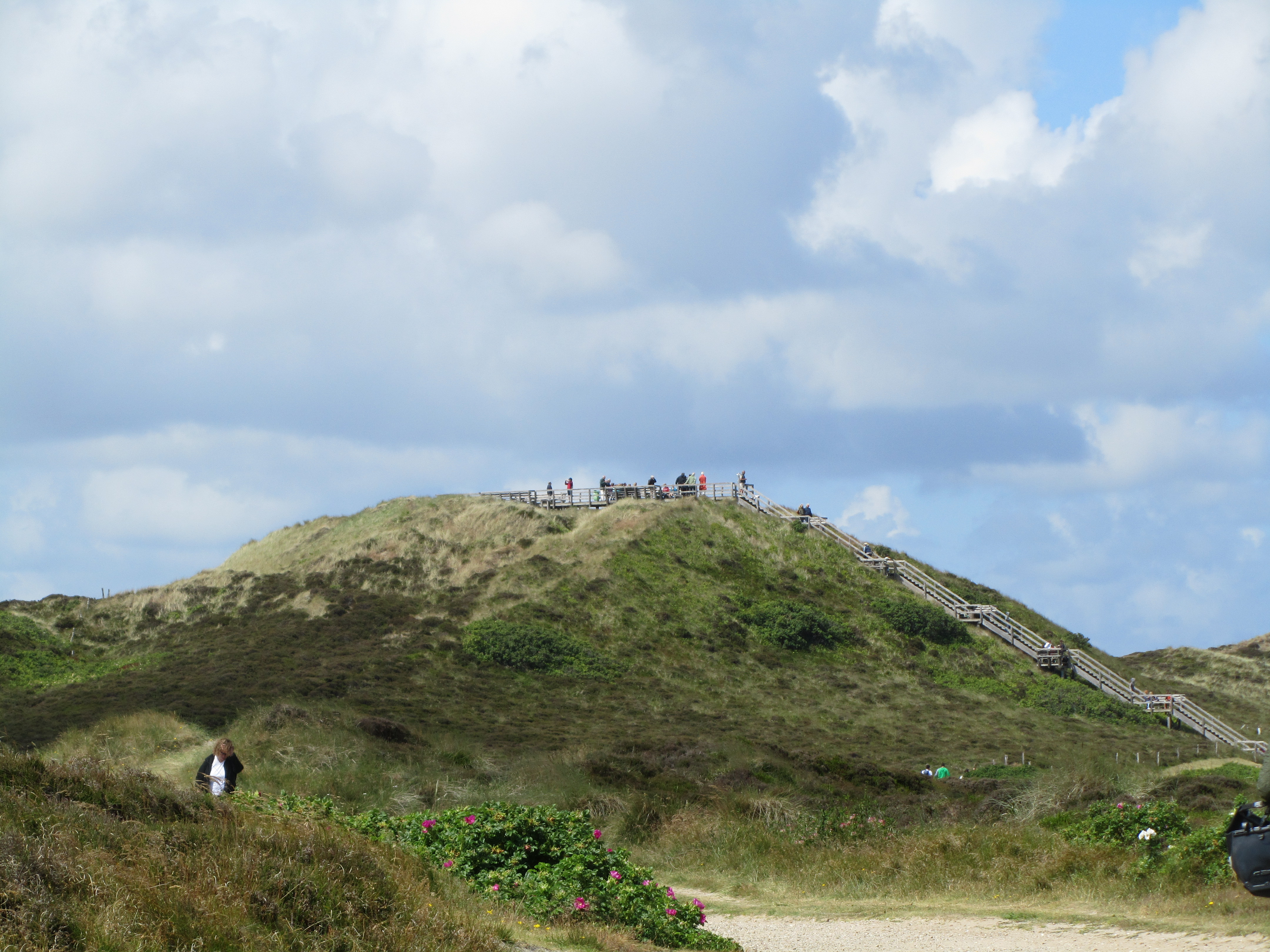 Die Uwe-Düne (52 m), höchste natürliche Erhebung der Insel Sylt von Osten.